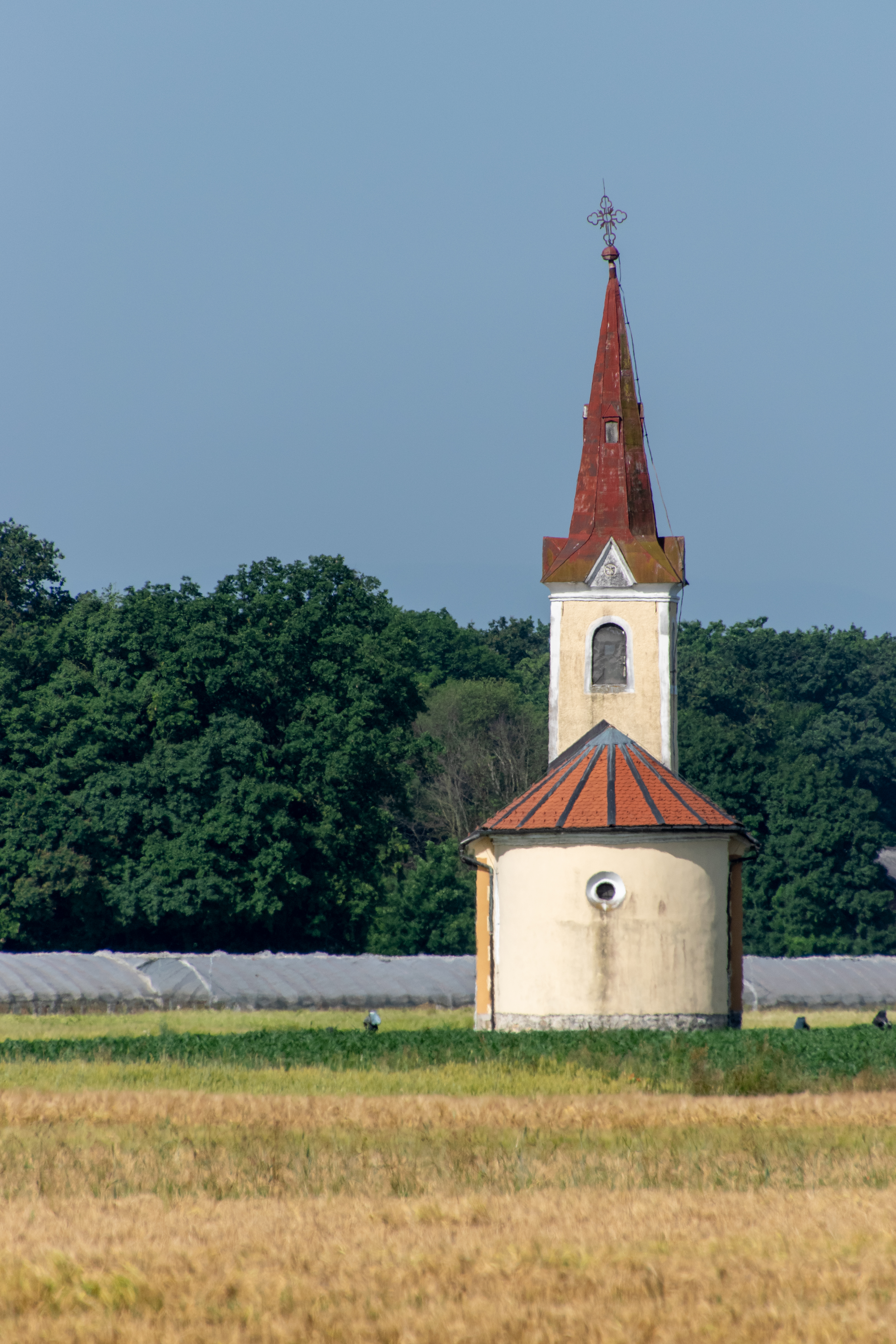 Sv. Miklavž